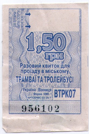 винницкий трамвайный билет